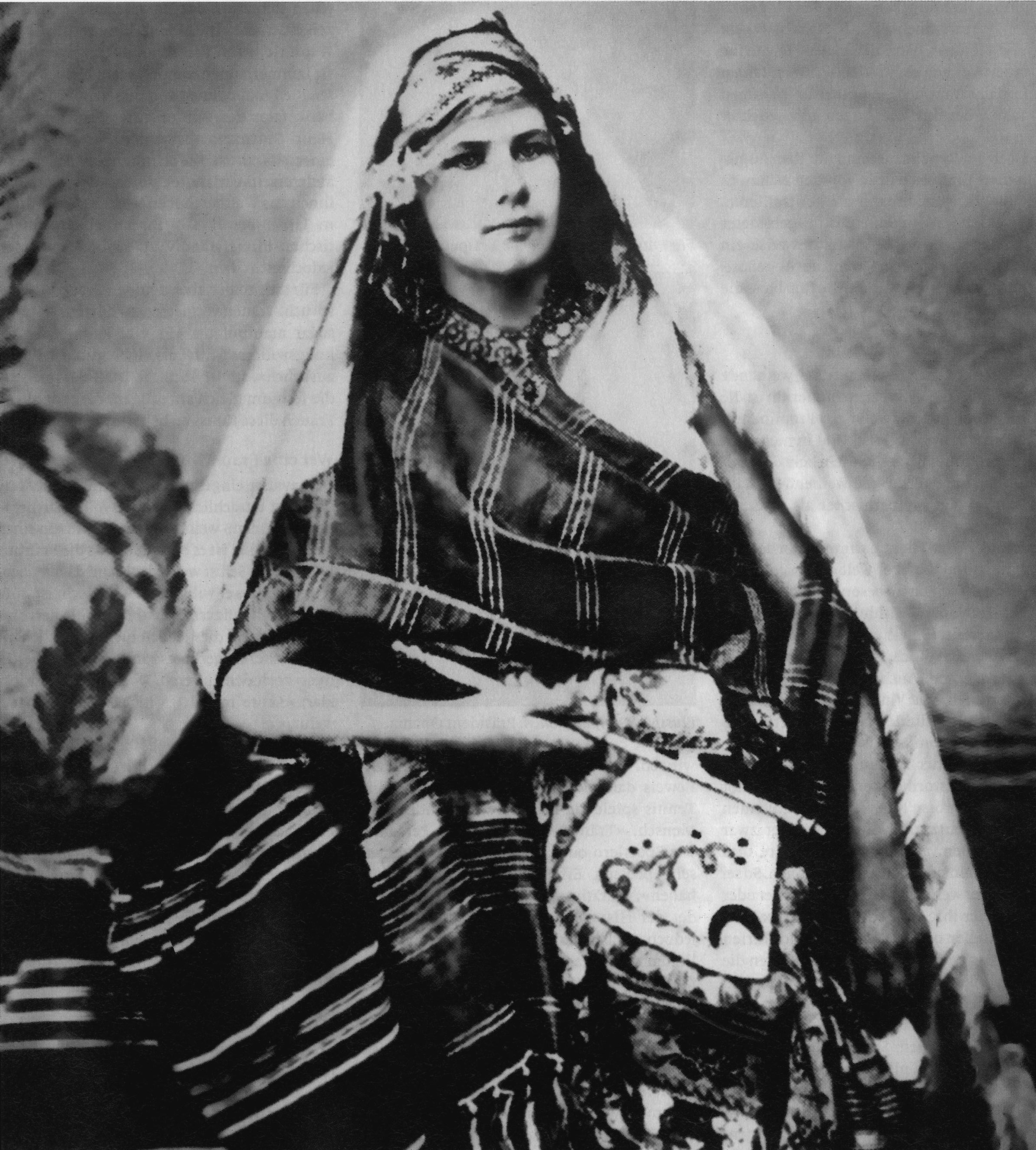 Isabelle Eberhardt in der Sahelwüste, um 1900